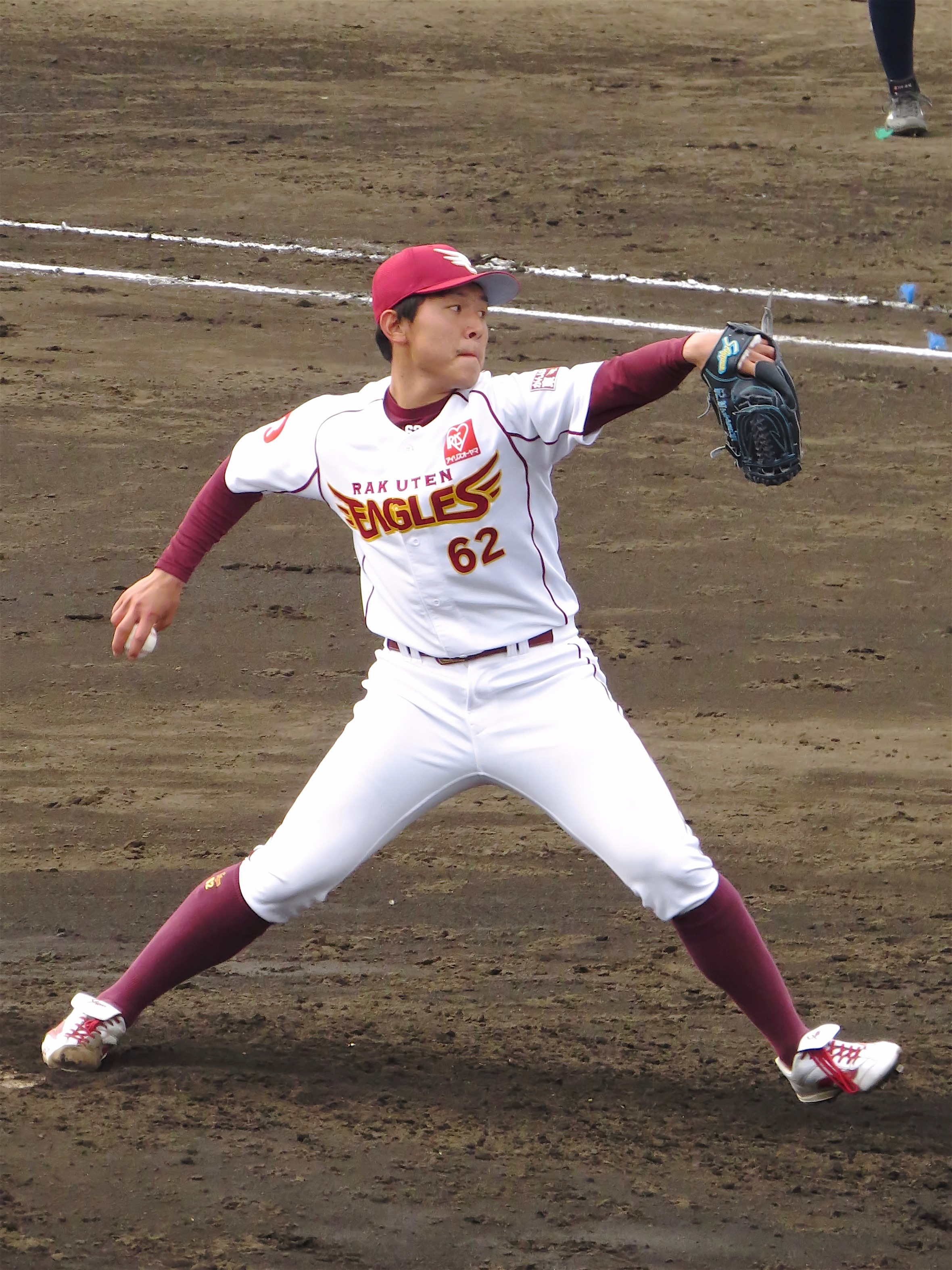 さいたま市営浦和球場にて